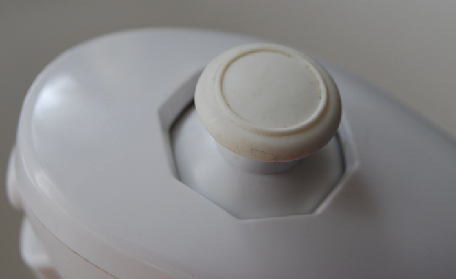 Аналоговый стик на контроллере Wii Nunchuk.